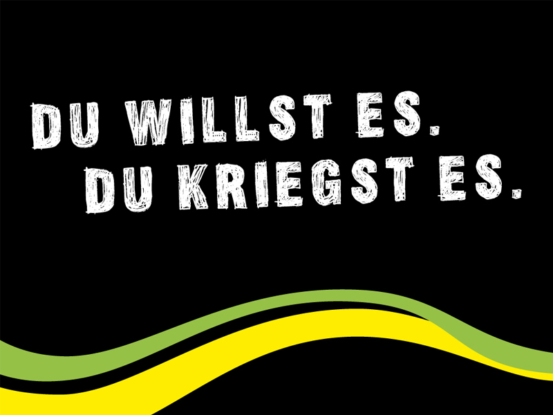 Der markant kolorierte Comic-Stil von congstar.